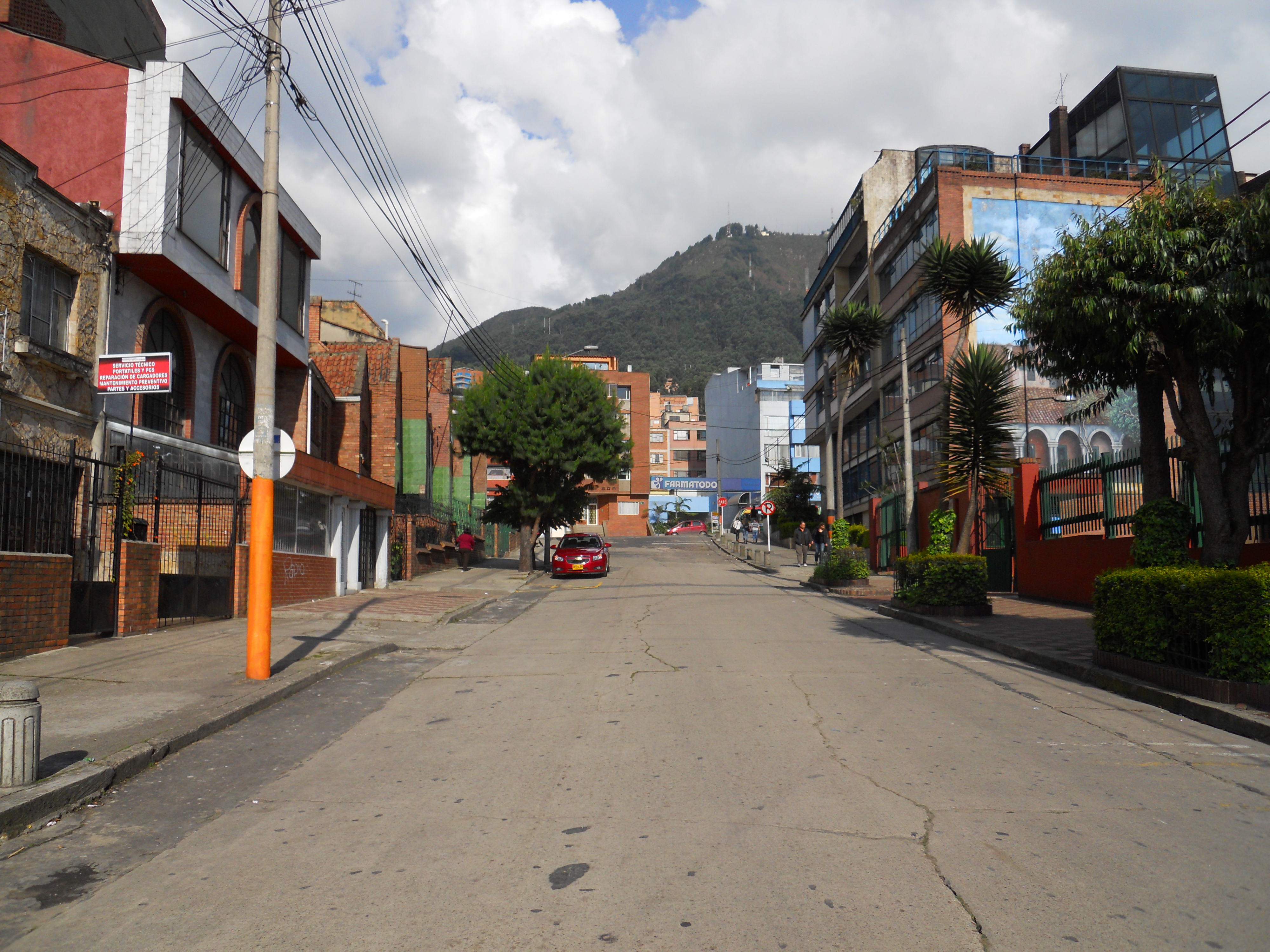 Bogotá carrera 7 con calle 51, barrio Pardo Rubio, Chapinero, Bogotá.